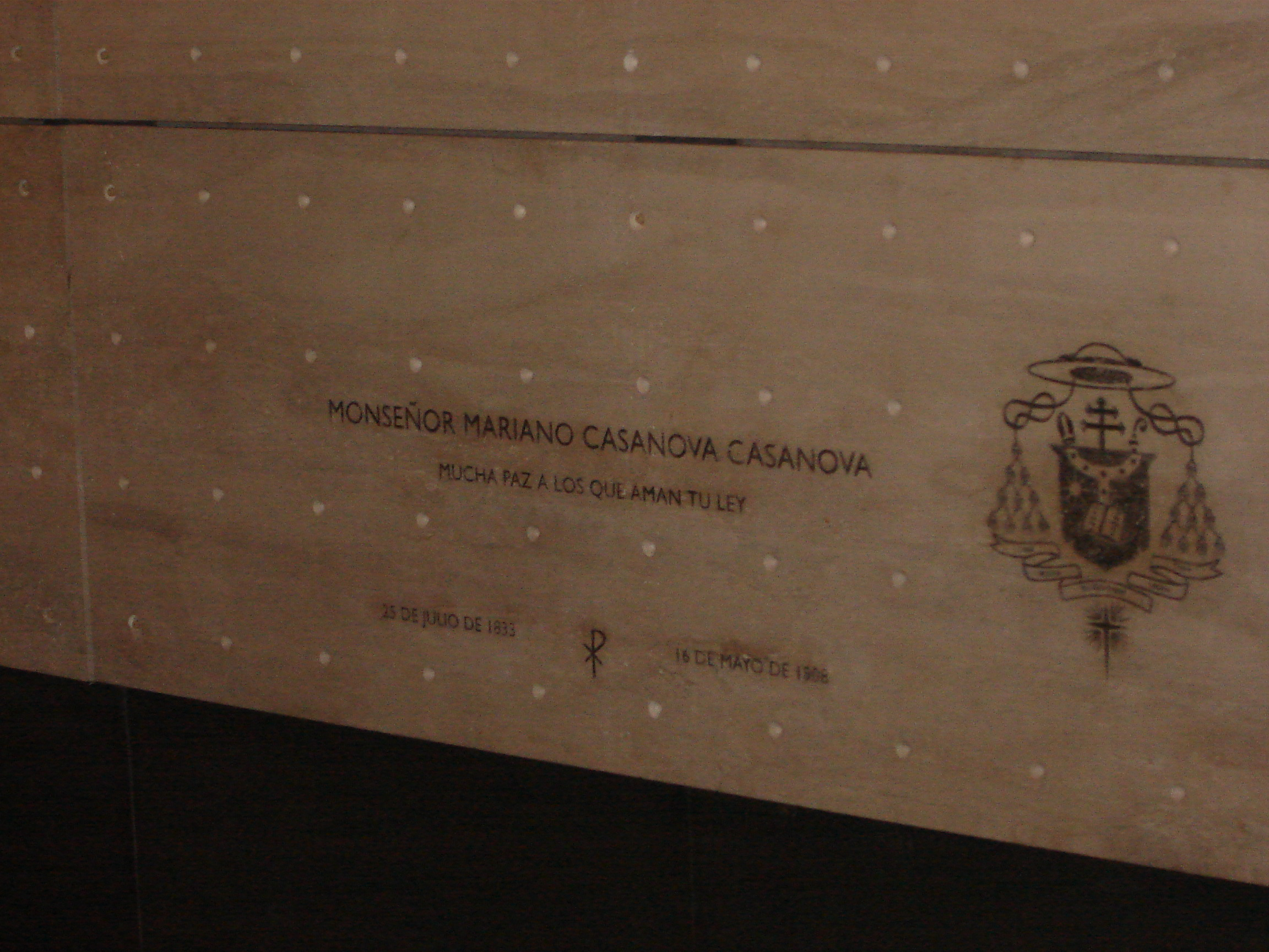 Es trabajo propio del autor